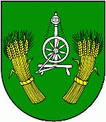 Erb Kukovej